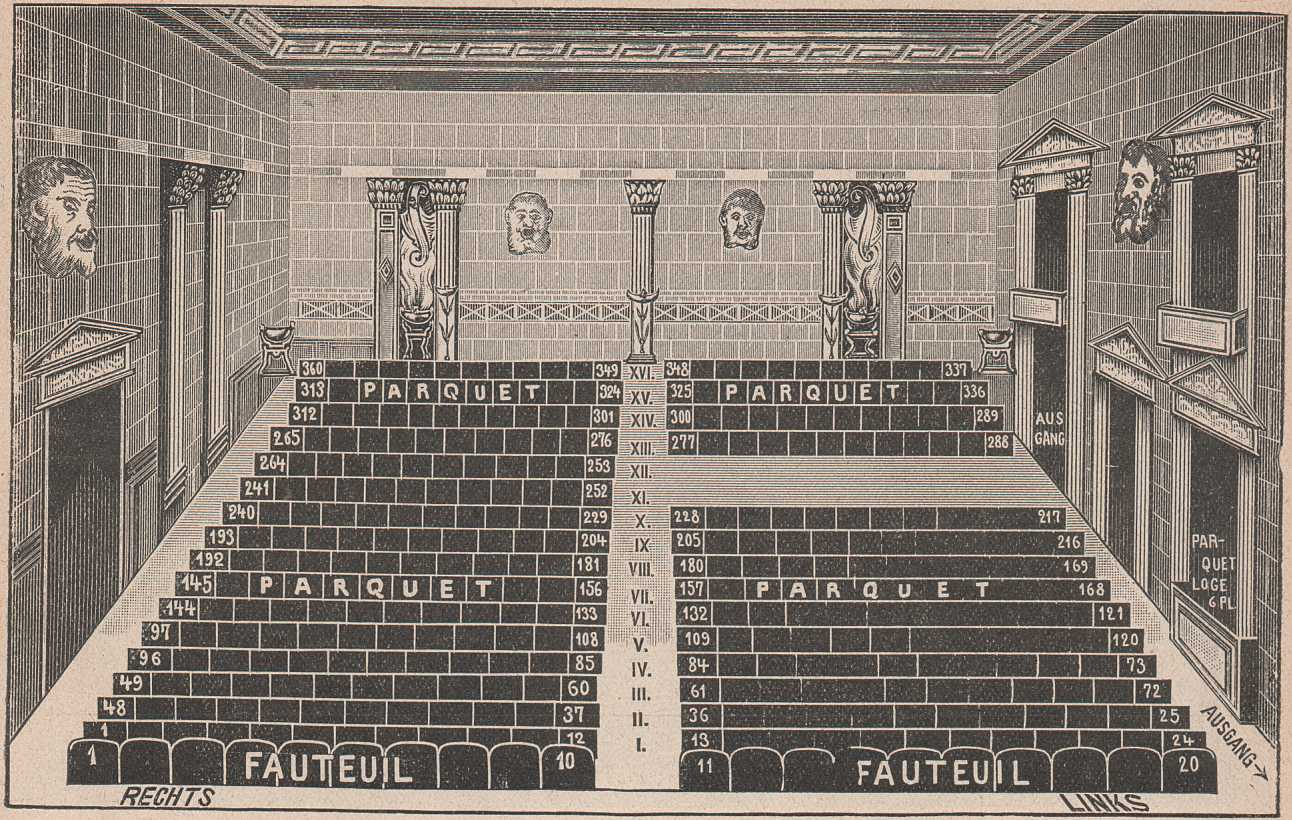 Rudolph Hertzog, Agenda 1912. Jahreskalender des Berliner Kaufhauses. Seite 102. Kleines Theater in Berlin, Unter den Linden 44. Leinen, 224 Seiten, 19,5 x 28,5 cm